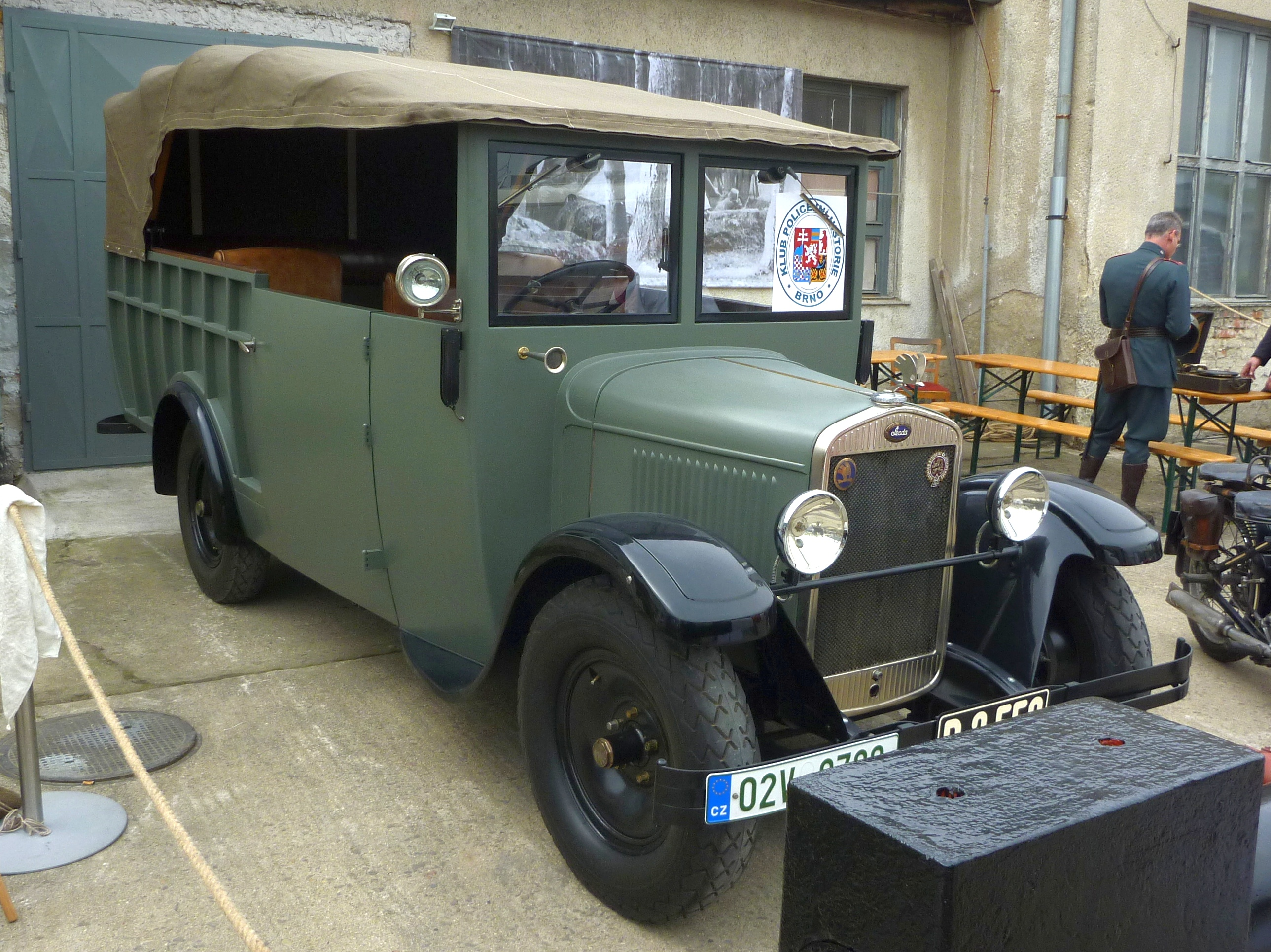 Policejní auto na DOD v depozitáři TMB v Řečkovicích